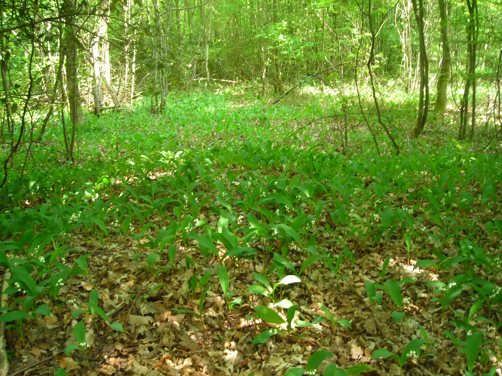 Muguet dans son environnement